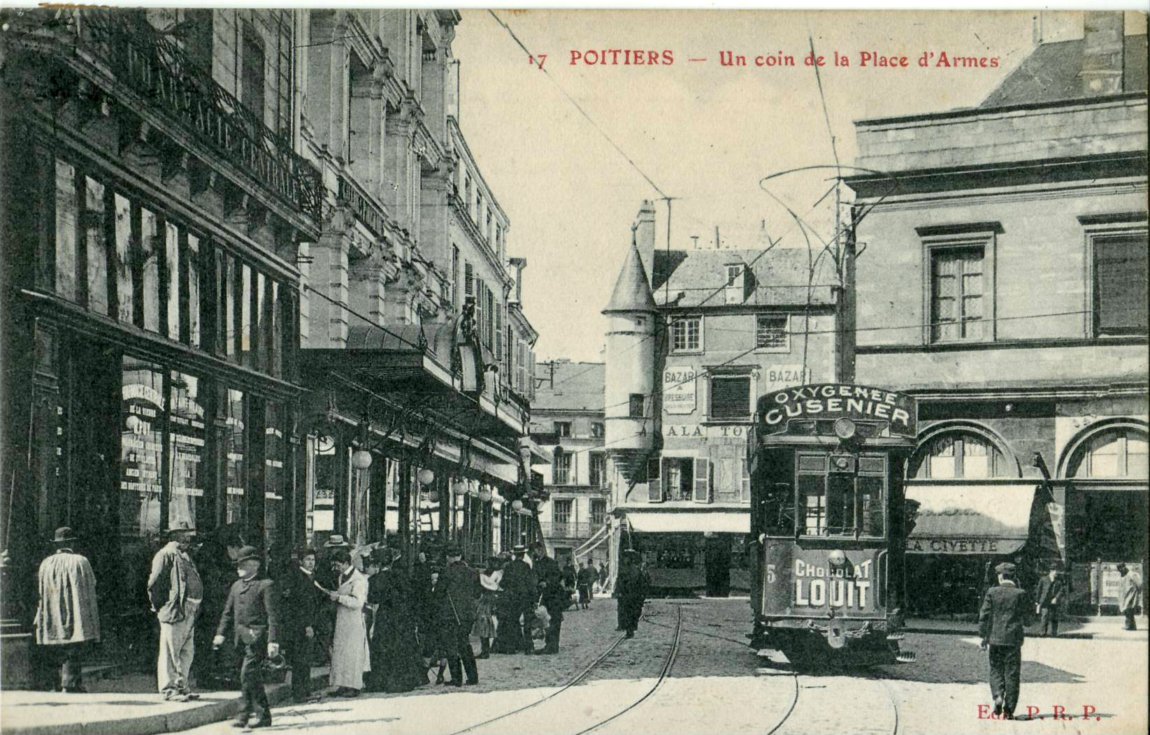 Carte postale ancienne éditée par P. R. P., n°17 : POITIERS - Un coin de la Place d'Armes